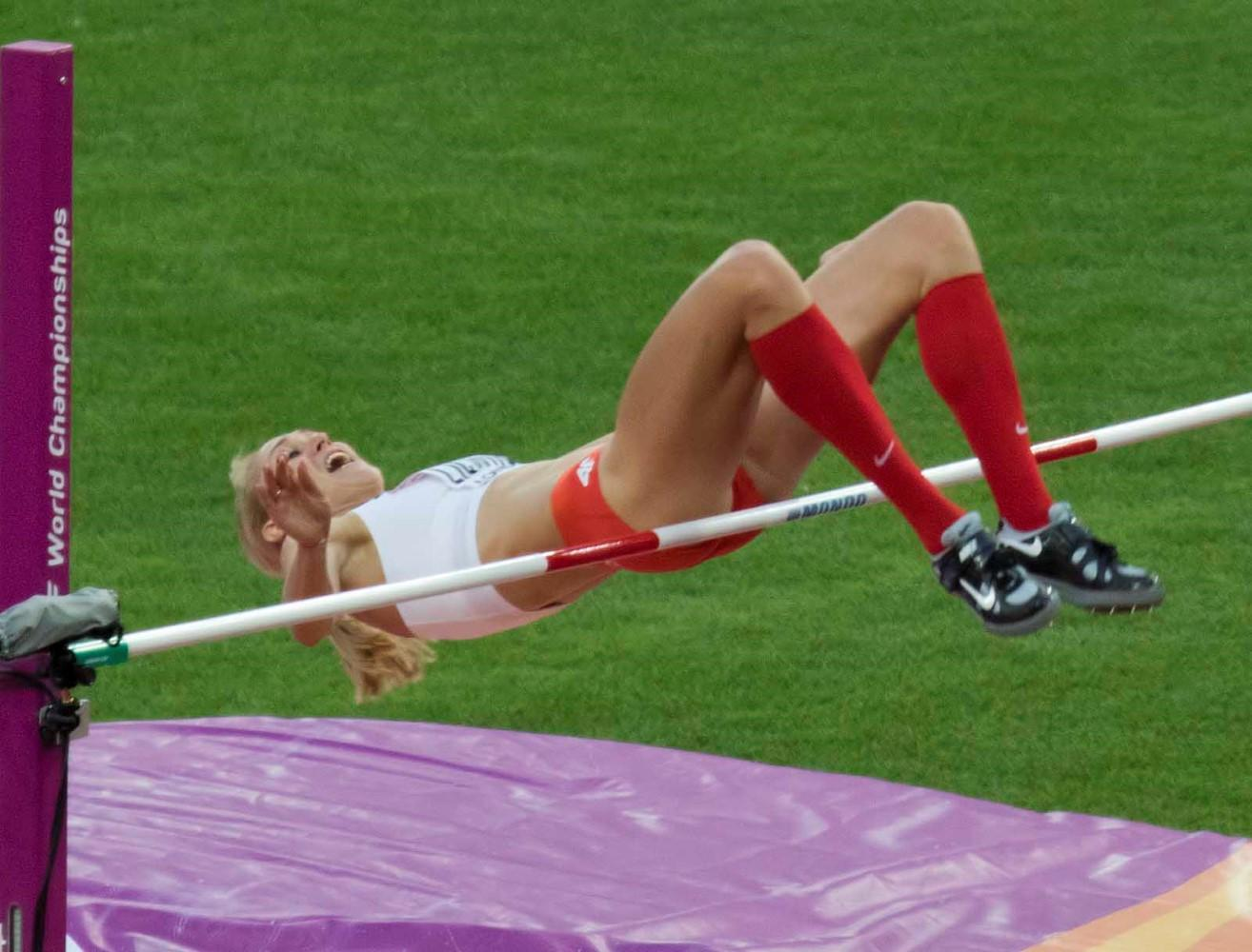 d8_20 hoog dames licwinko